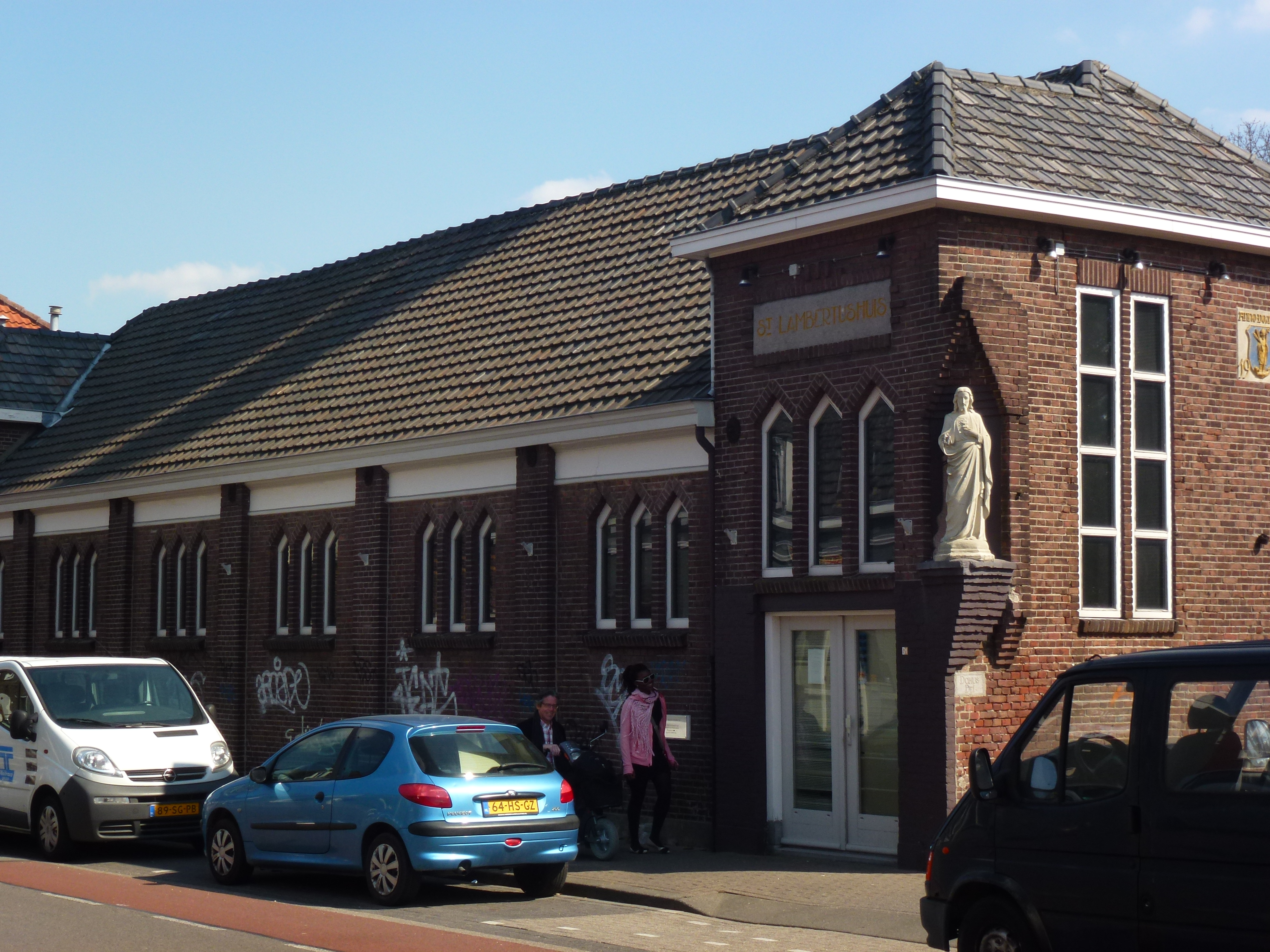 Hoogstraat 297, Eindhoven - Patronaatsgebouw